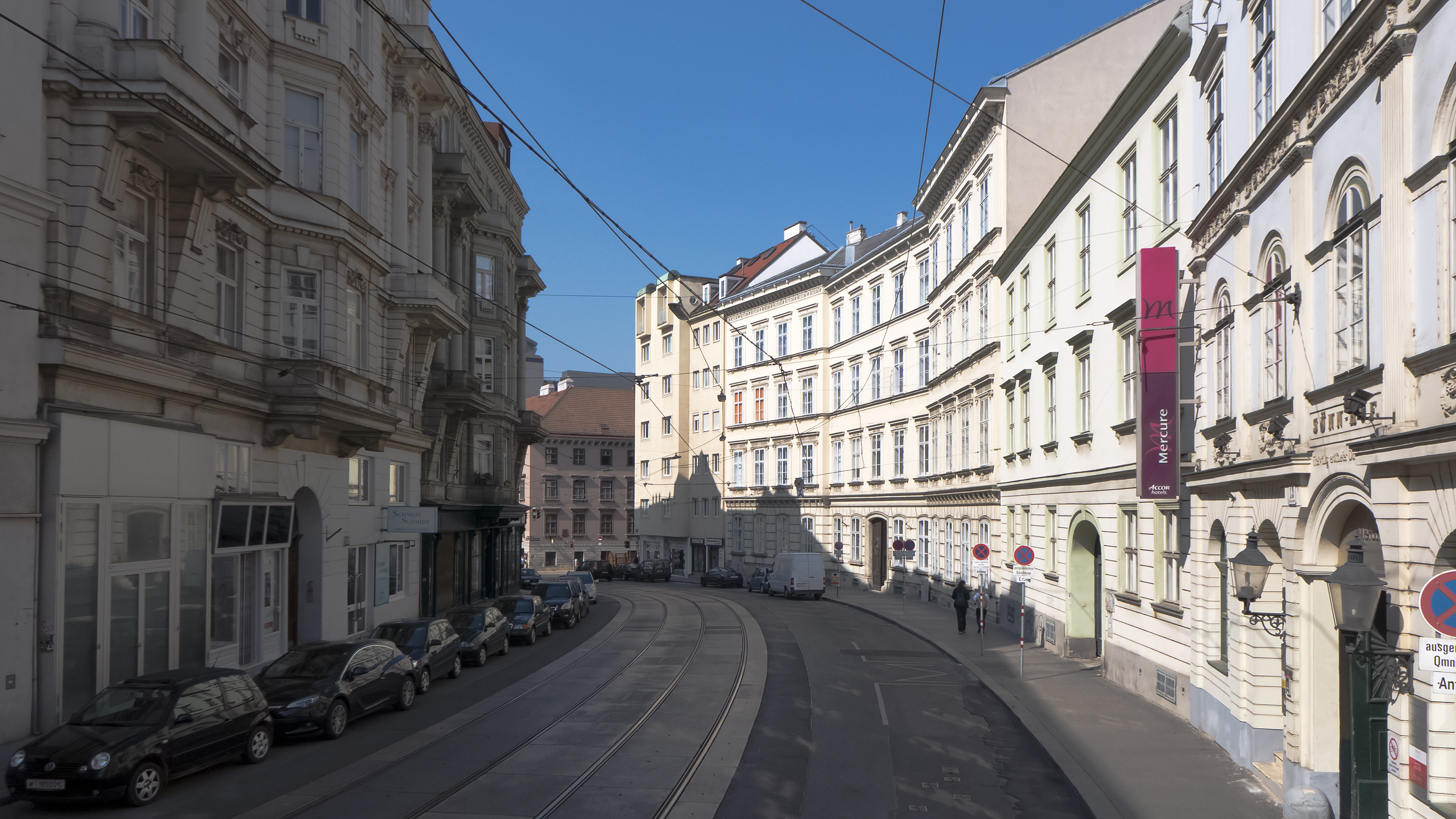 Ungargasse in Wien 3 bei Nr. 13 Richtung Nordwesten